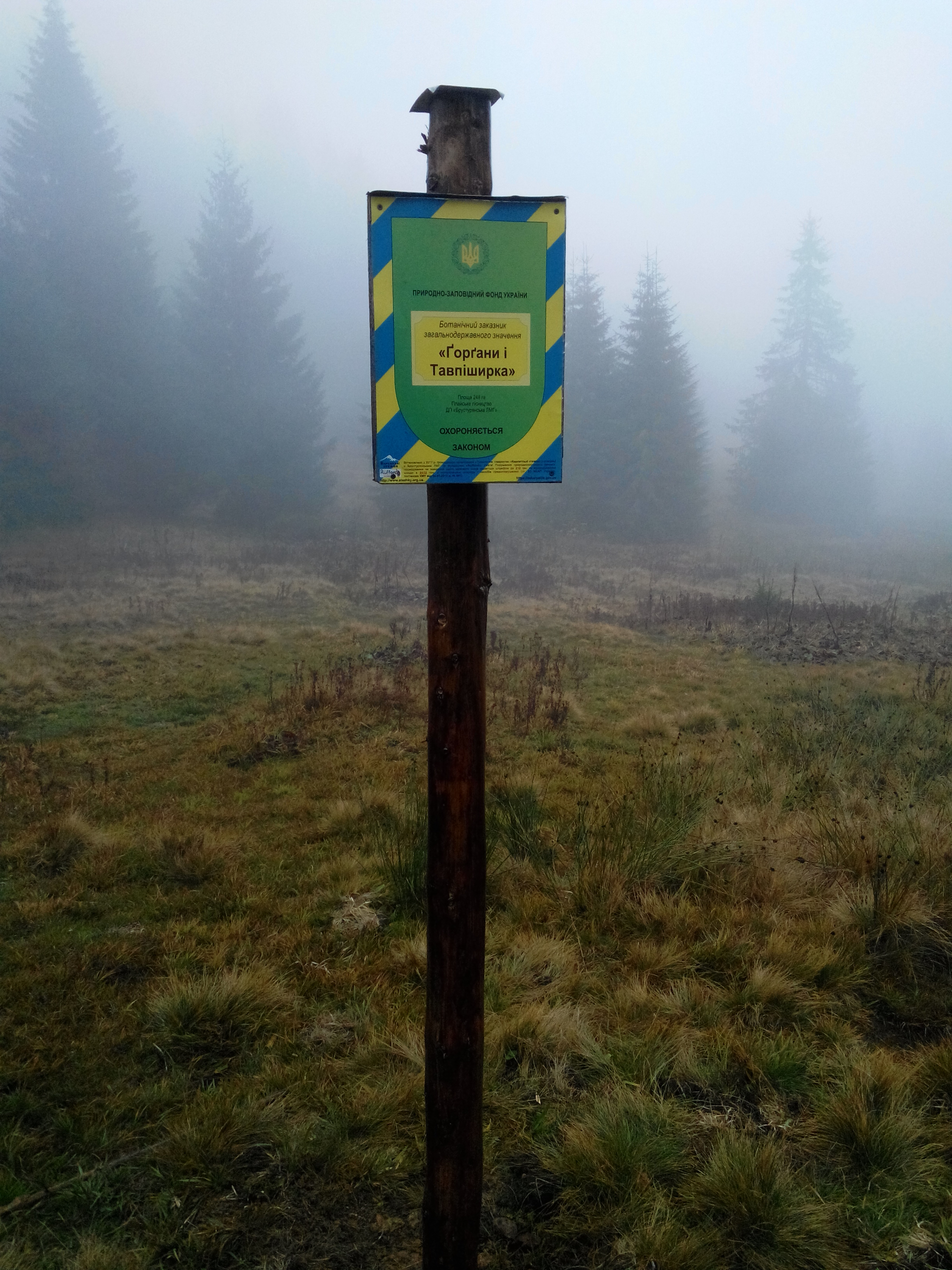 Встановлений з боку полонини біля старого кордону (стовпчик №25)